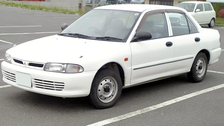 三菱・ランサー（4代目）